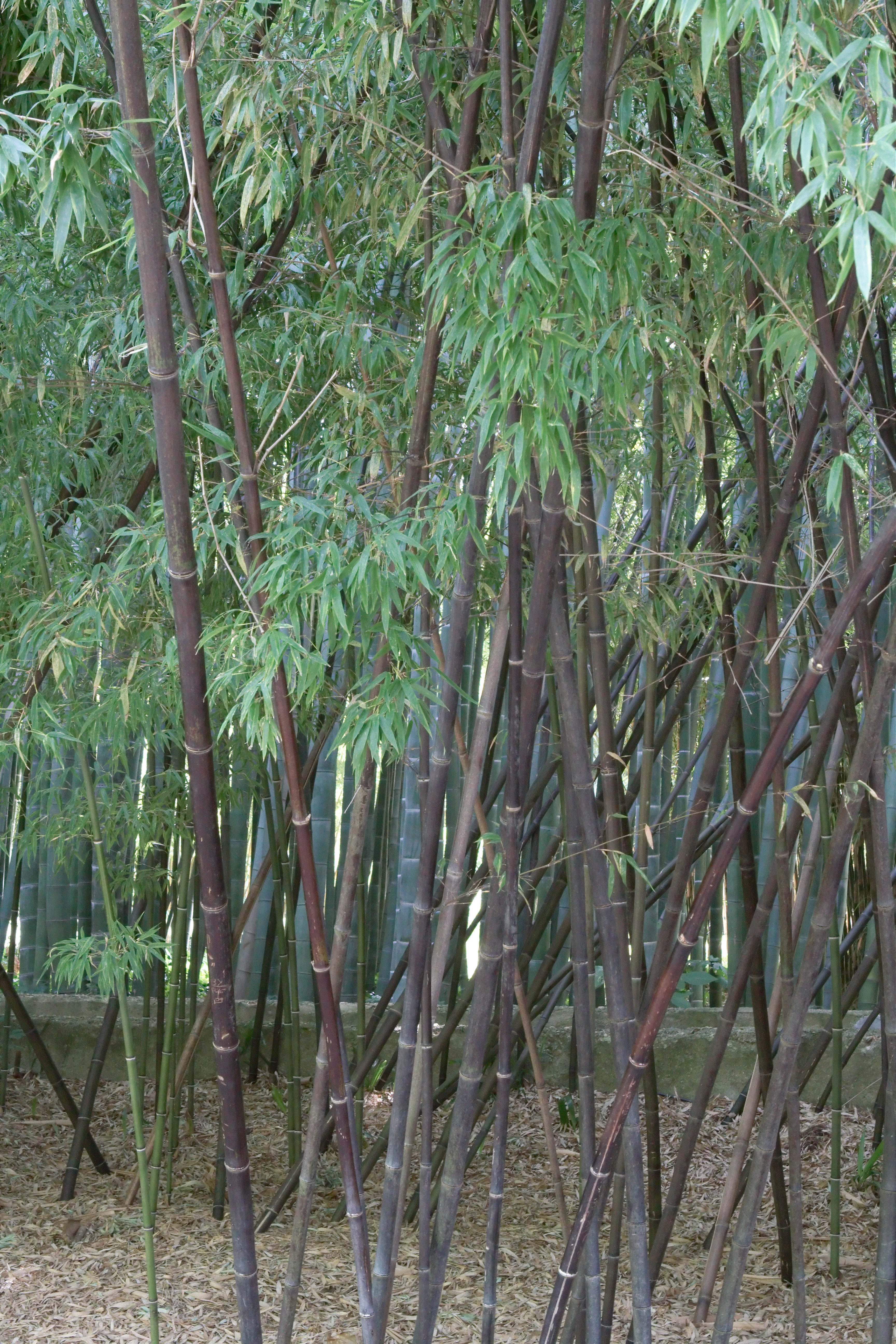 Phyllostachys nigra à la bambouseraie de Prafrance (Gard, France).